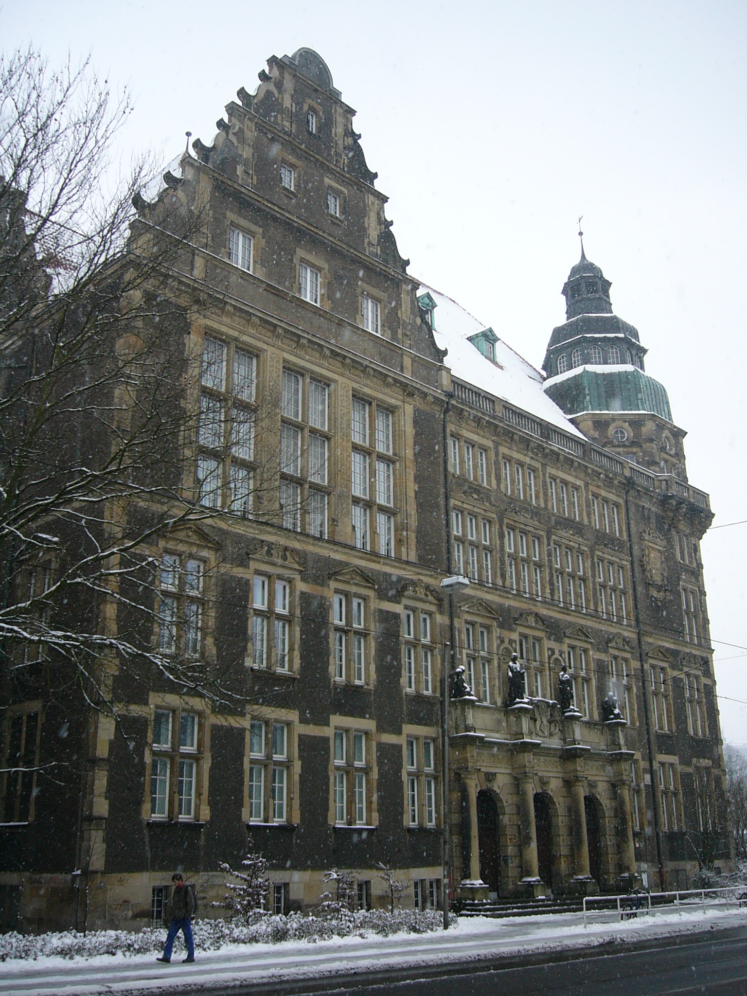 Hermann-Böse-Gymnasium Front Das abgebildete Objekt ist ein geschütztes Kulturdenkmal in der Freien Hansestadt Bremen, mit der Nr. 0591,T beim Landesamt für Denkmalpflege registriert.